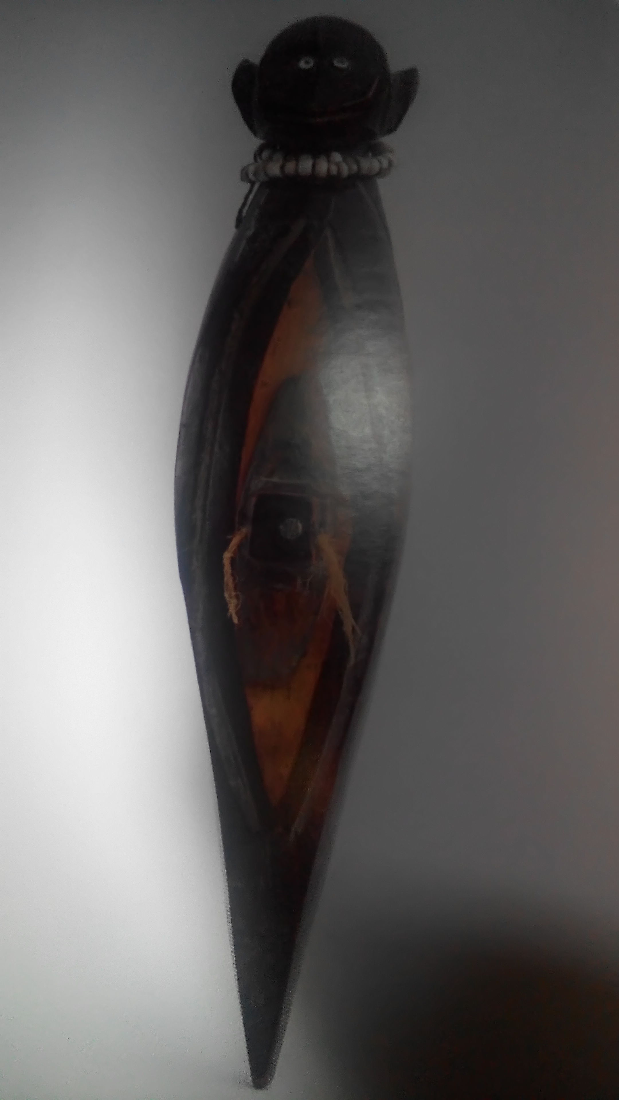 Instrument culturel au Bas-Uele